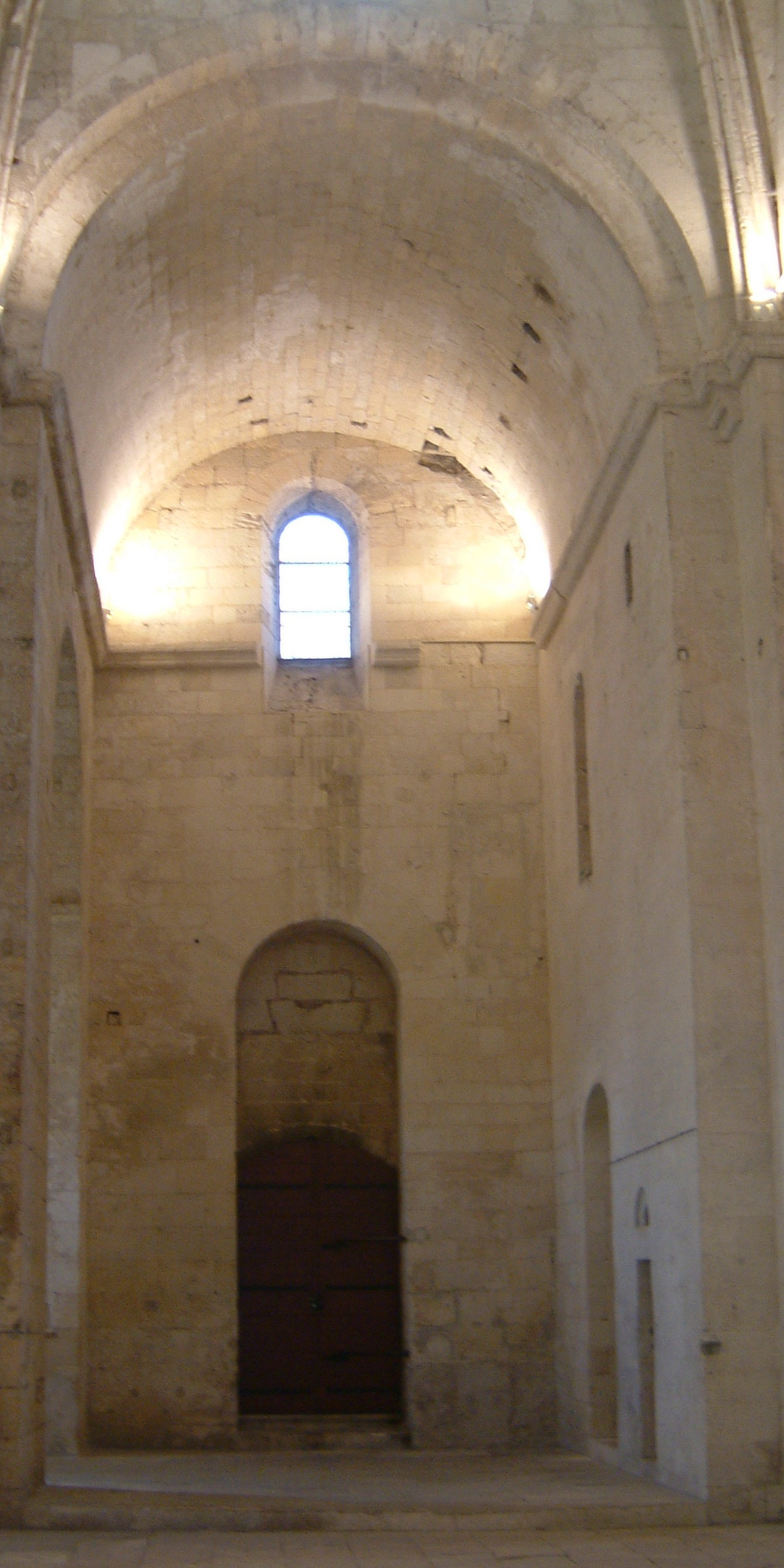 Bras sud du transept in der Kloster-Kirche Notre-Dame der Abtei Saint-Pierre in Montmajour (12. Jh., Alpilles, Südfrankreich)